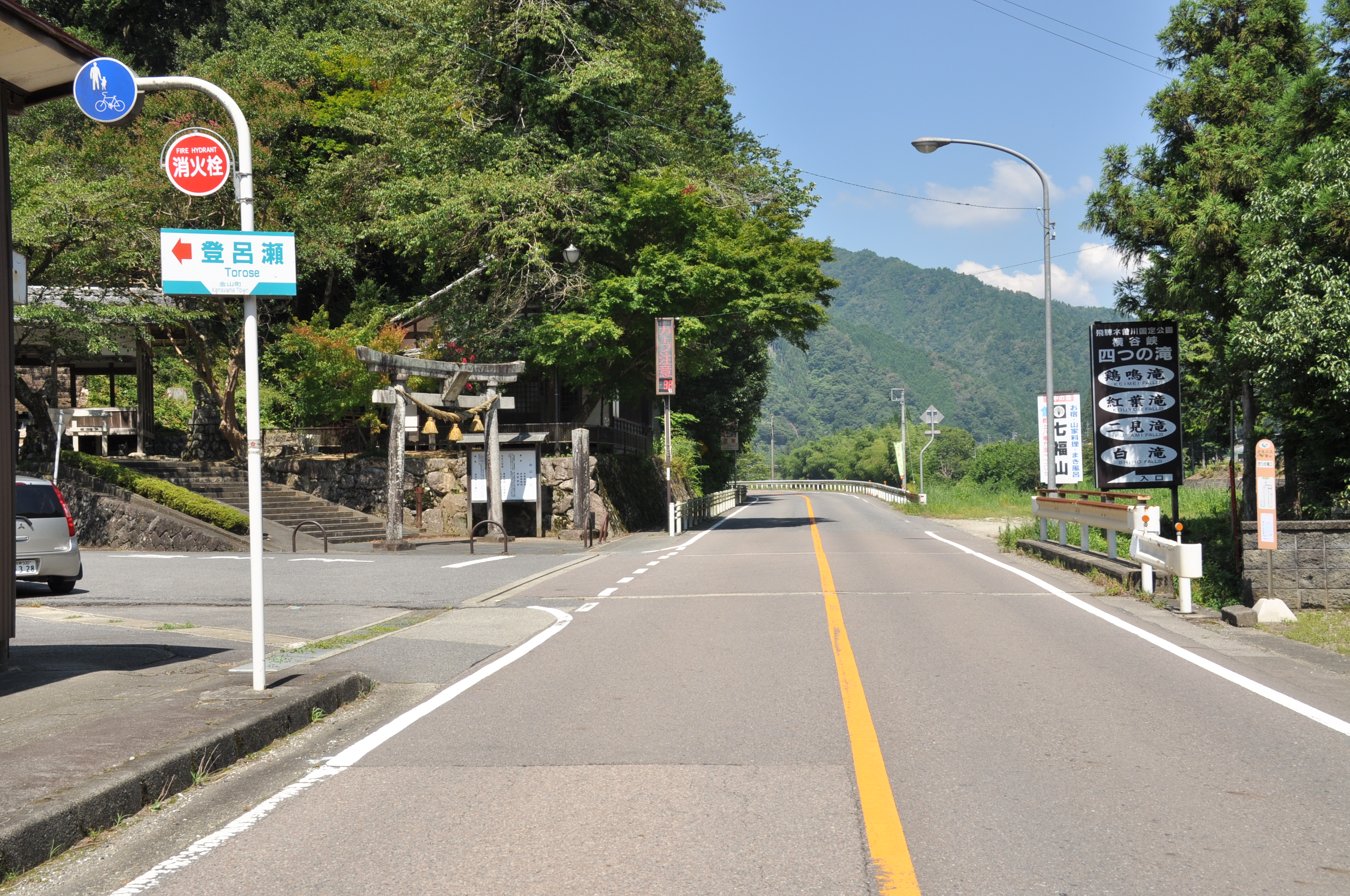 横谷峡国道256号線入口